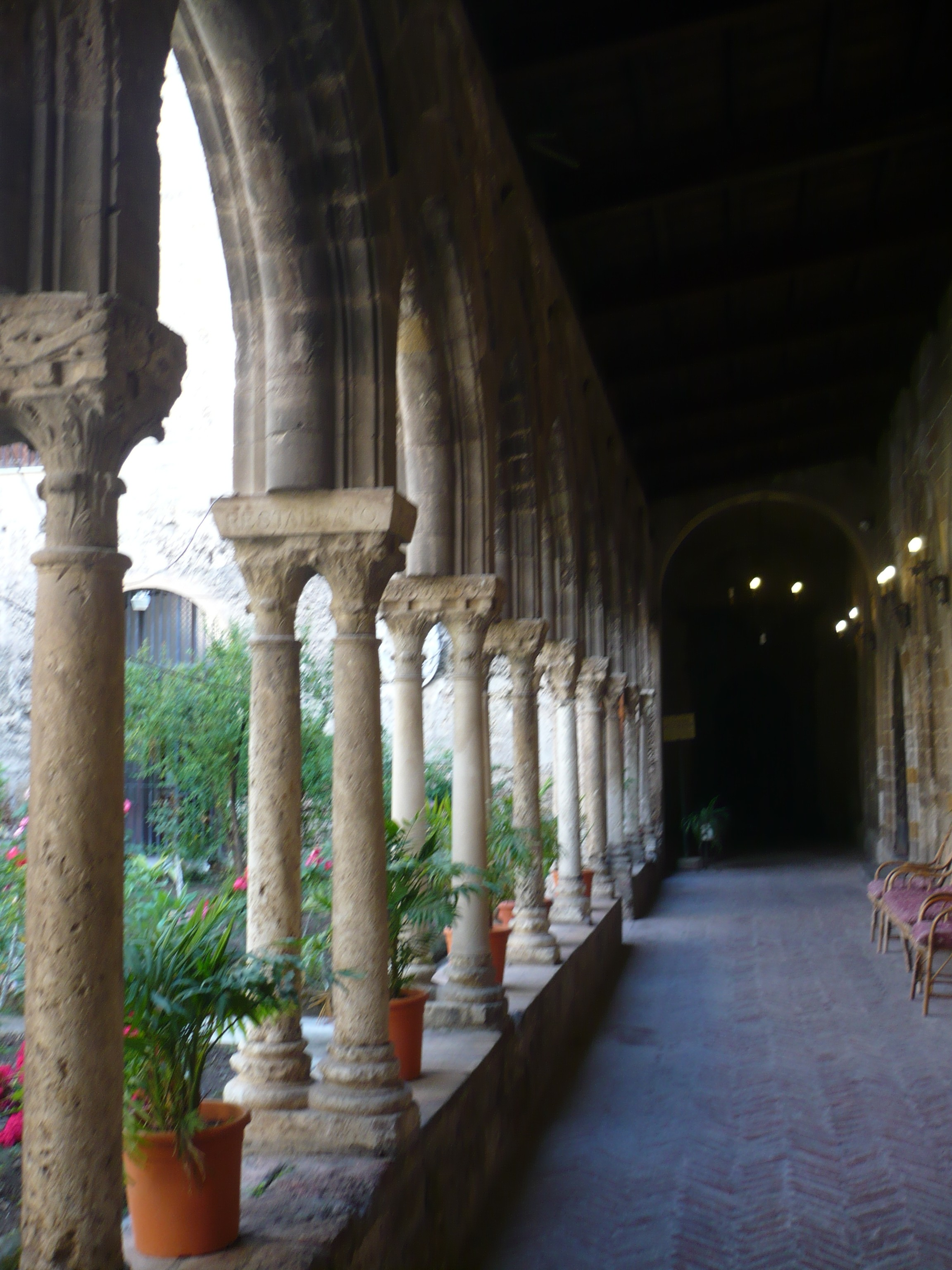 La Magione, Kreuzgang, Südostseite